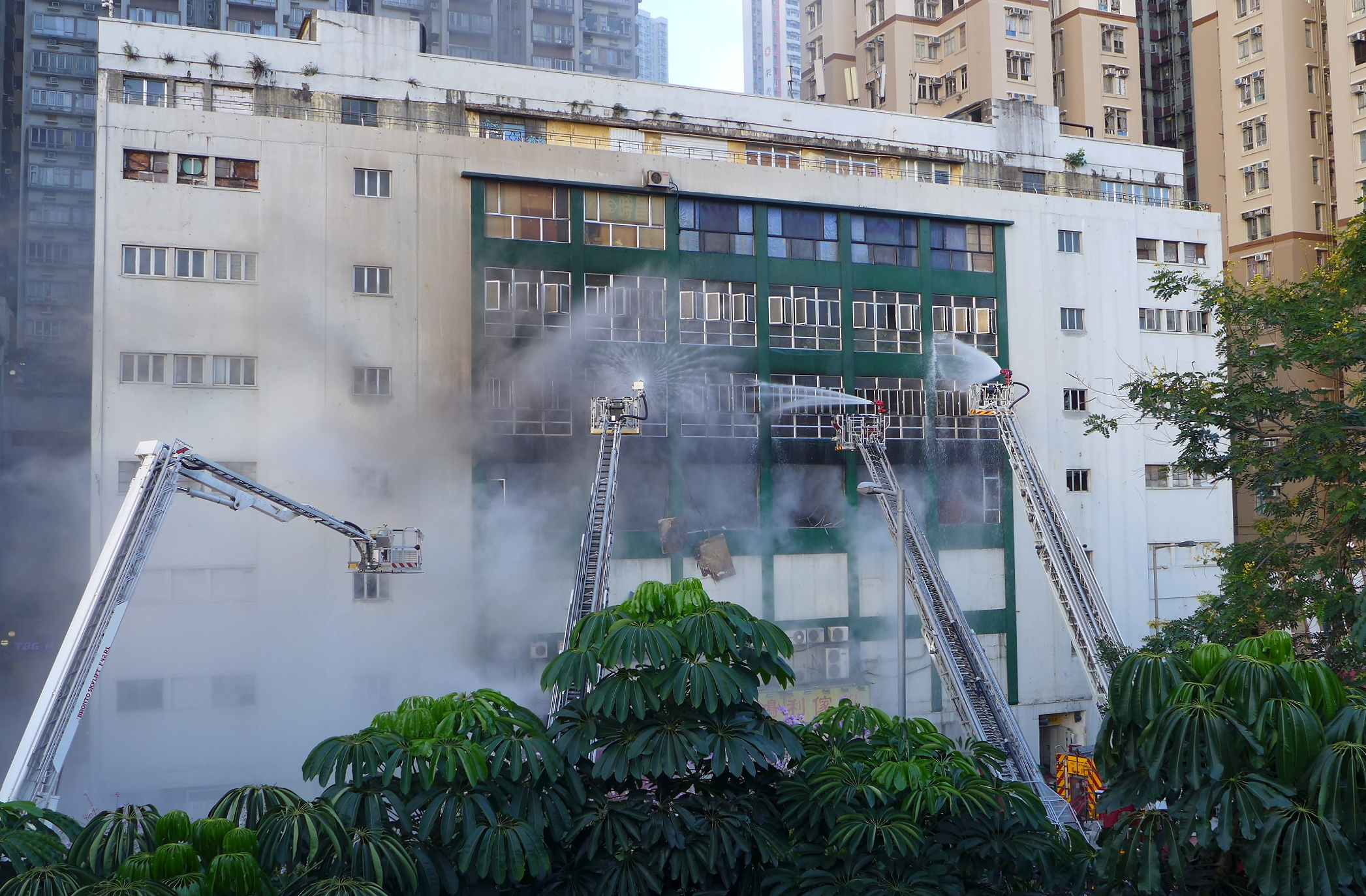 Ngau Tau Kok Fire